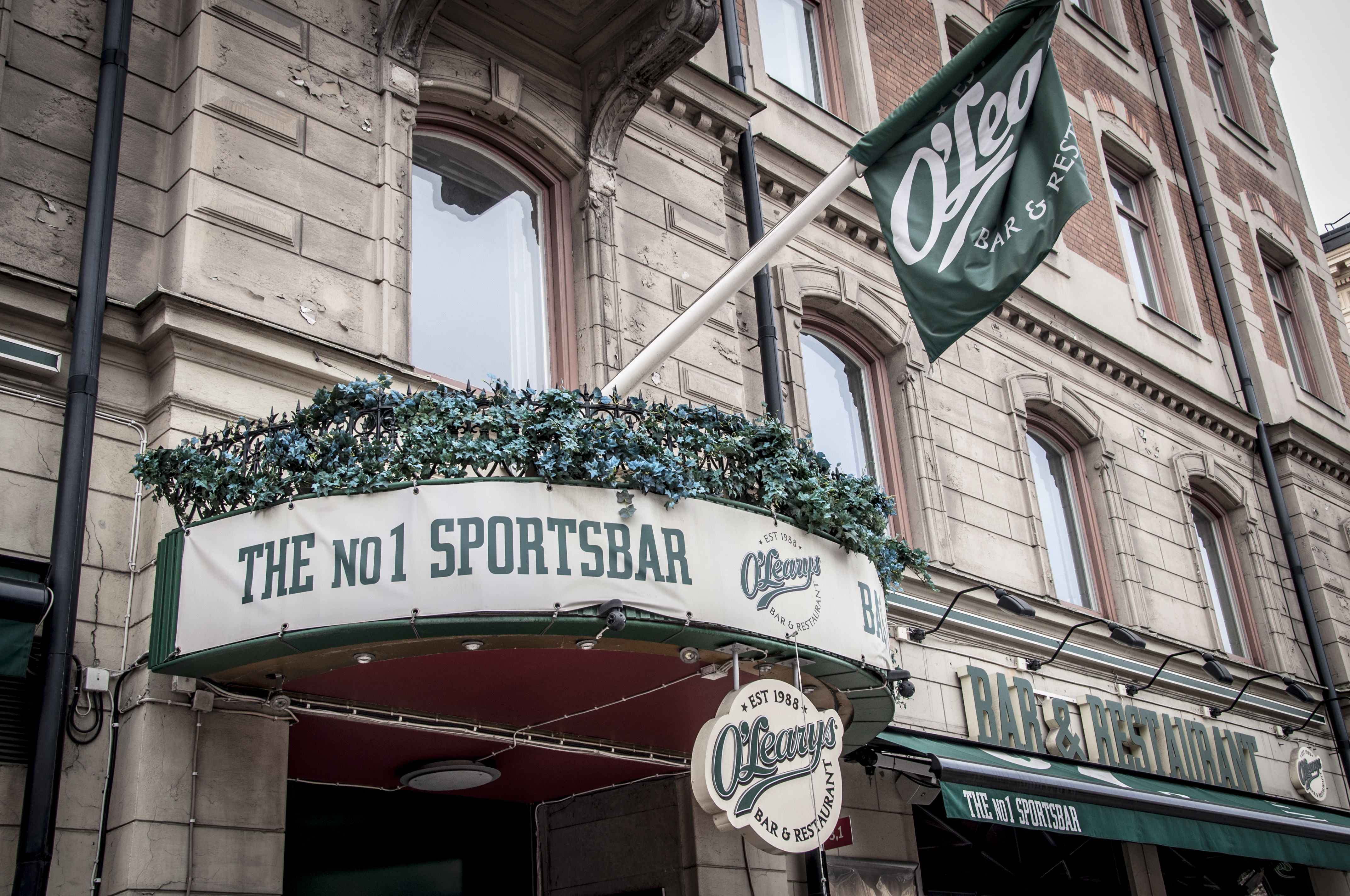 O'Learys Norrmalm, Regeringsgatan 113